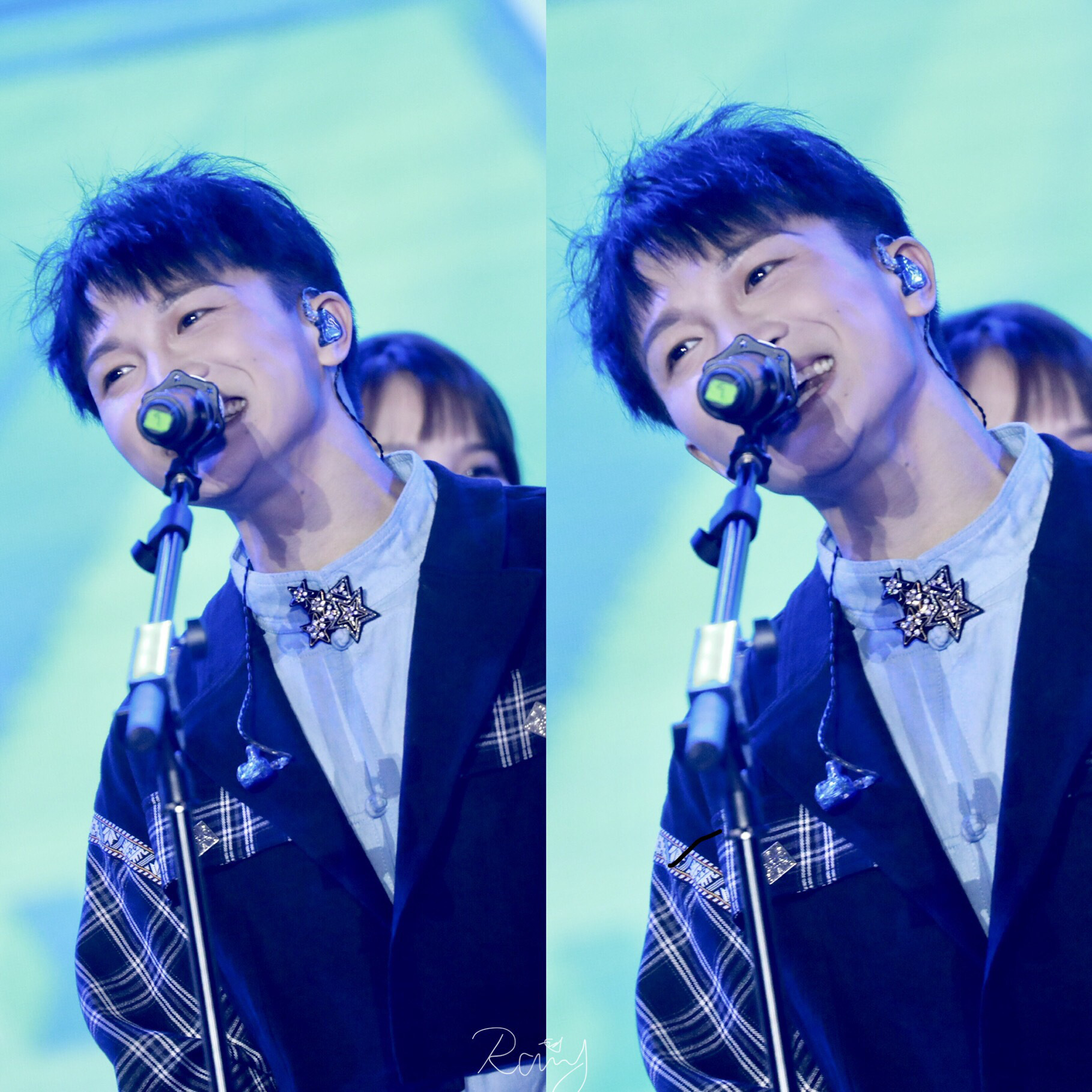 中文（中国大陆）: 2019年5月24日，周深在湖州参加“酷狗直播in雄联盟 - 新声合伙人”。